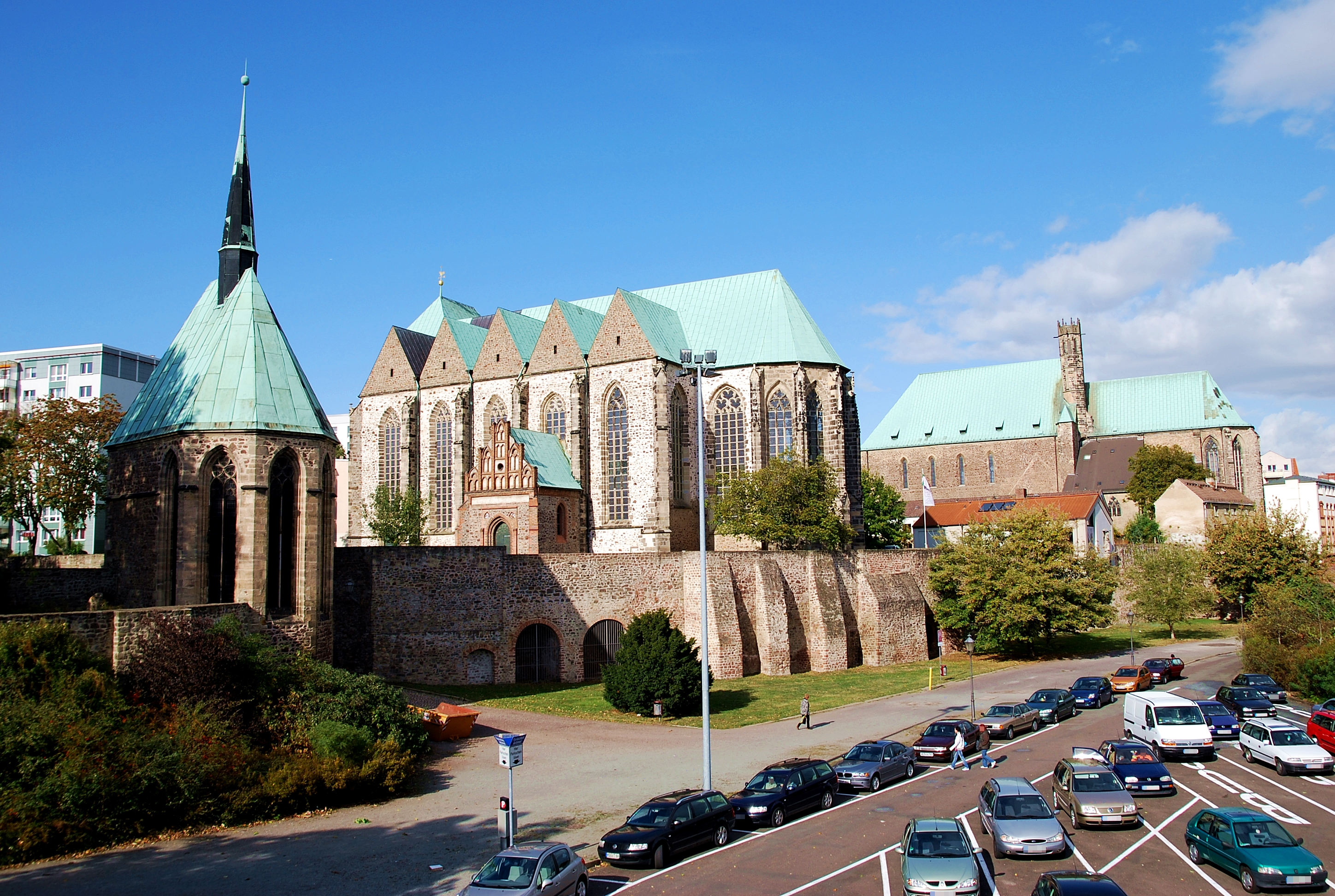 Magdalenenkapelle, Kirche St. Petri und Wallonerkirche St. Augustini in Magdeburg